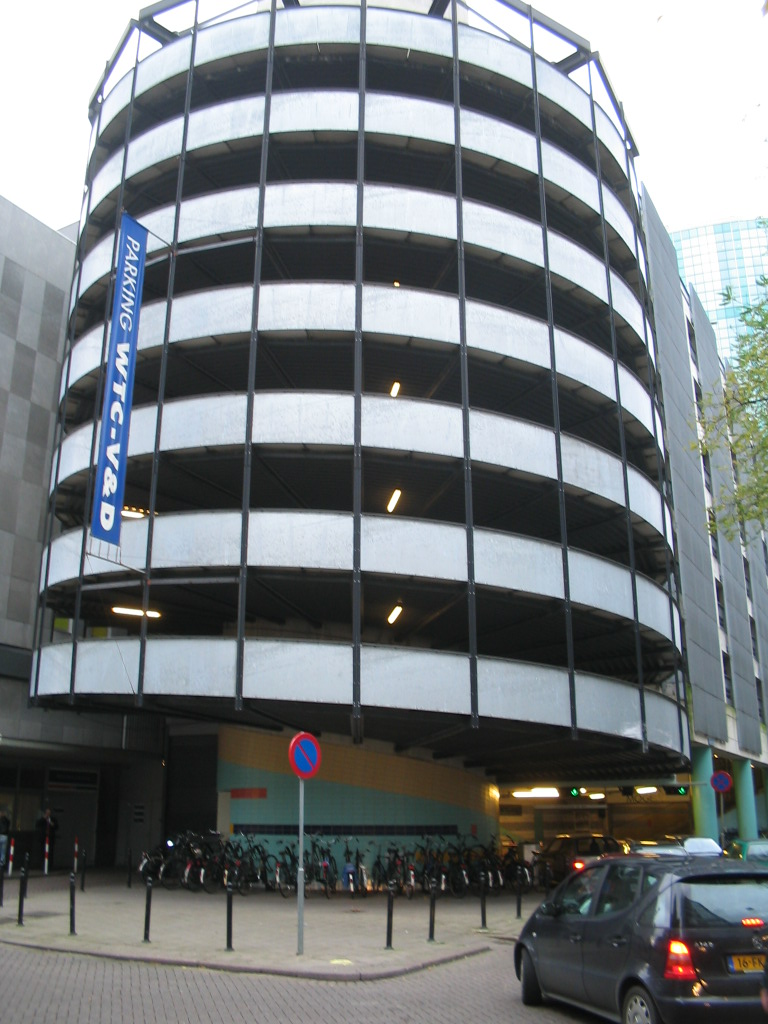 parkeergarage Rotterdam